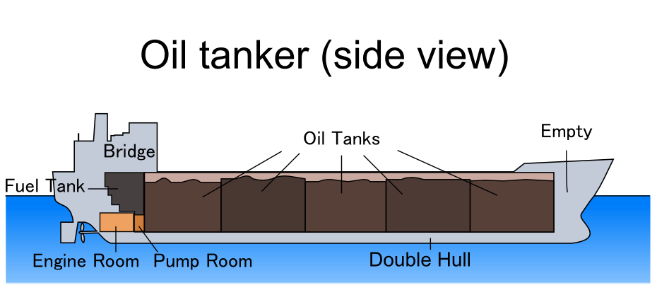 Oil tanker (side view)